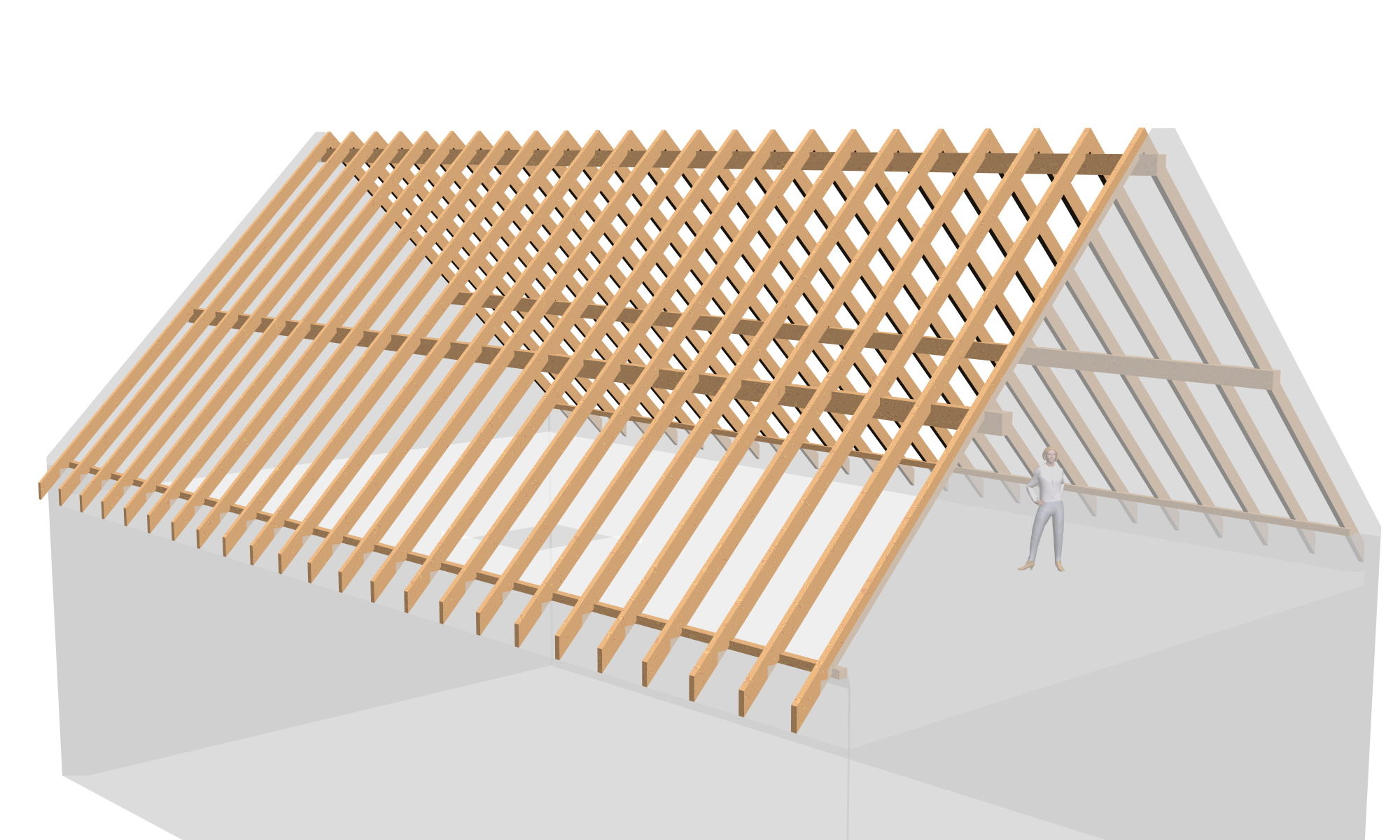 Pfettendach